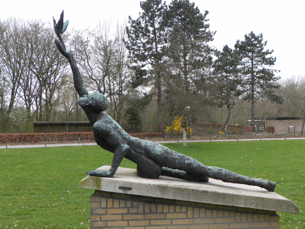 "Leven en dood" bij het crematorium in Groningen, gemaakt door Anna Dekking.